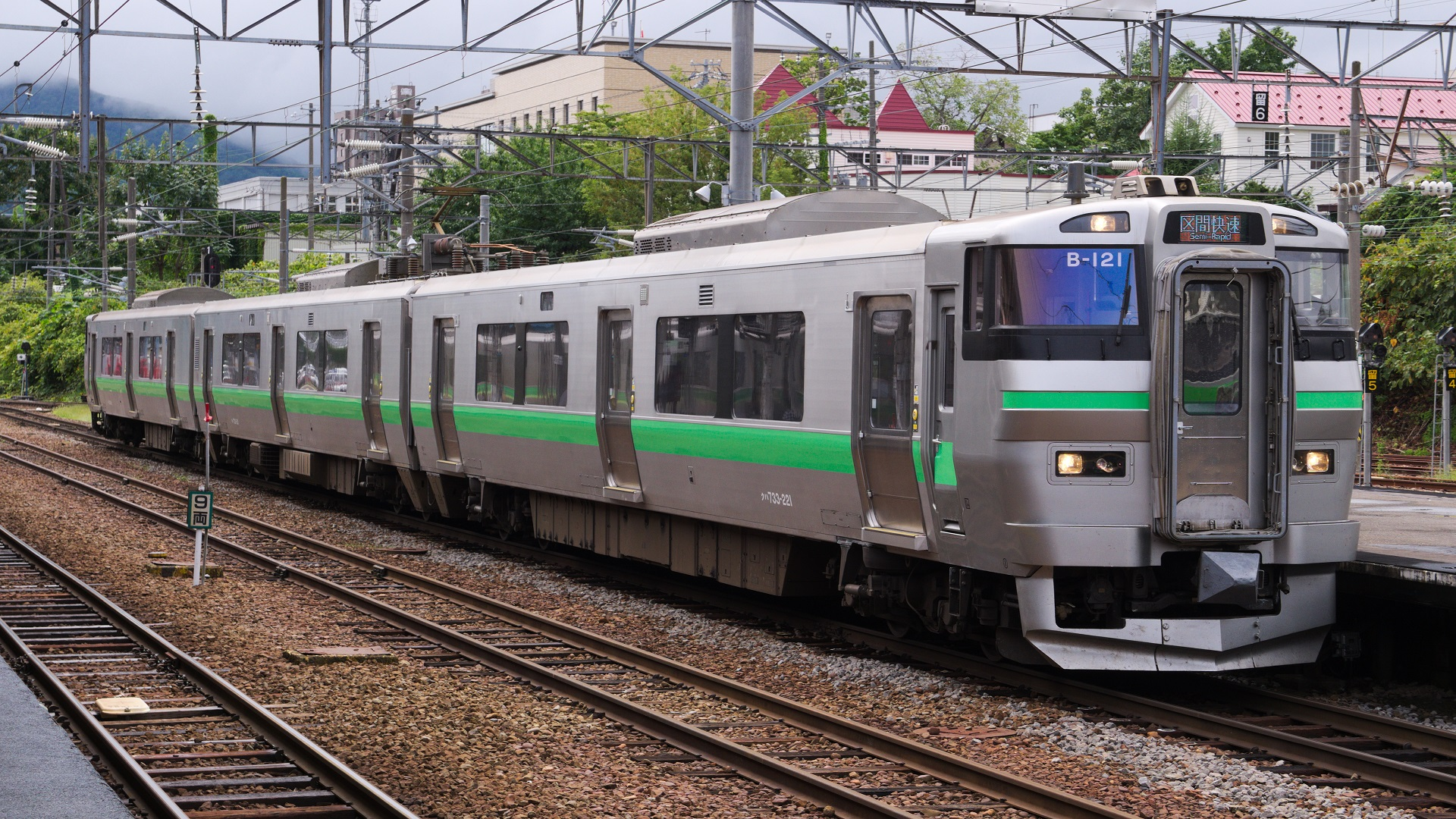 小樽駅に進入する733系電車